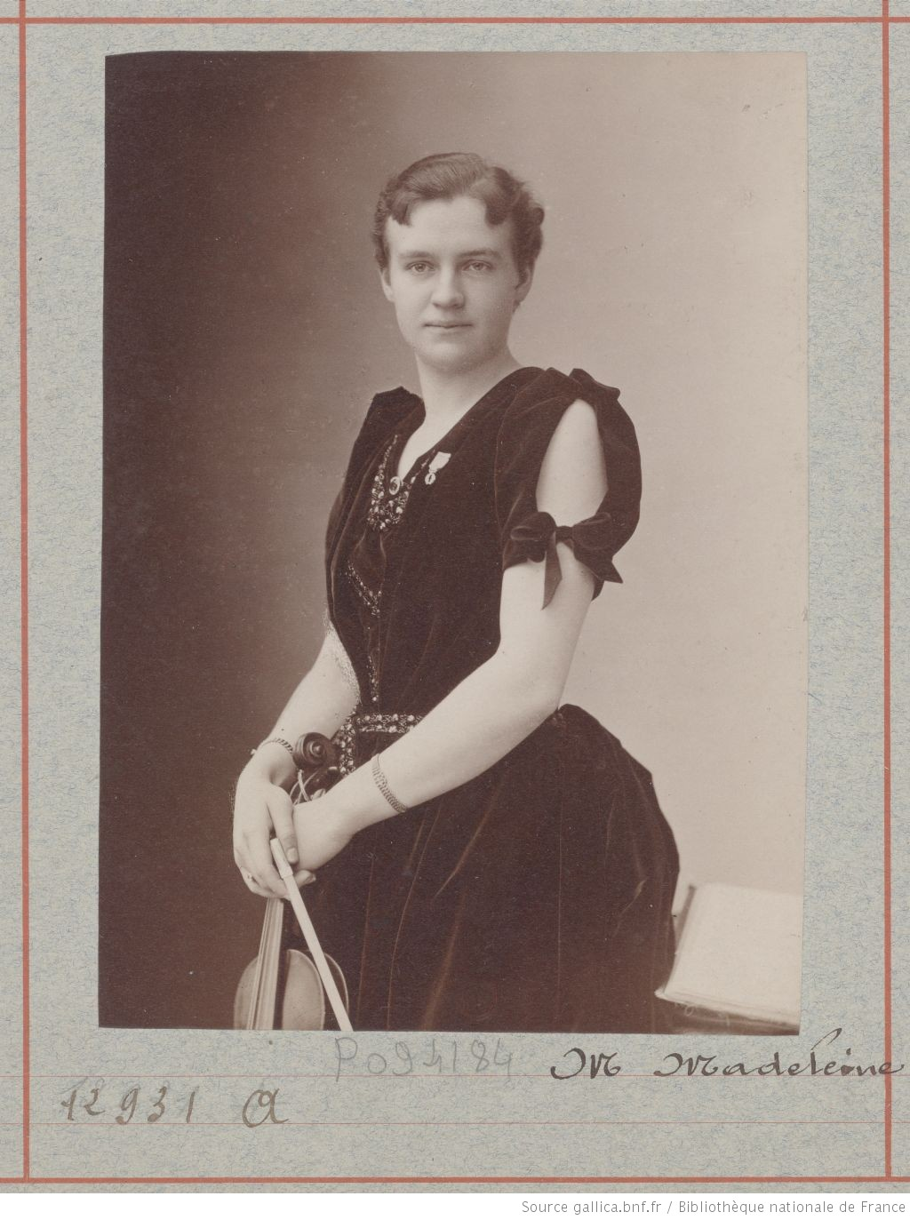 Magdeleine Godard (1860-1940) violoniste, photographie atelier Nadar, (BNF/gallica)